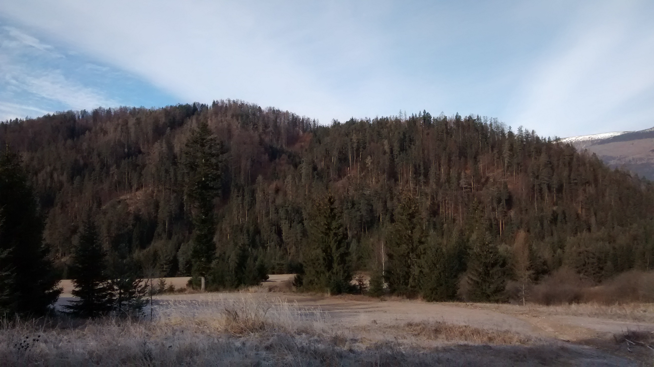 Zlatnianske skalky